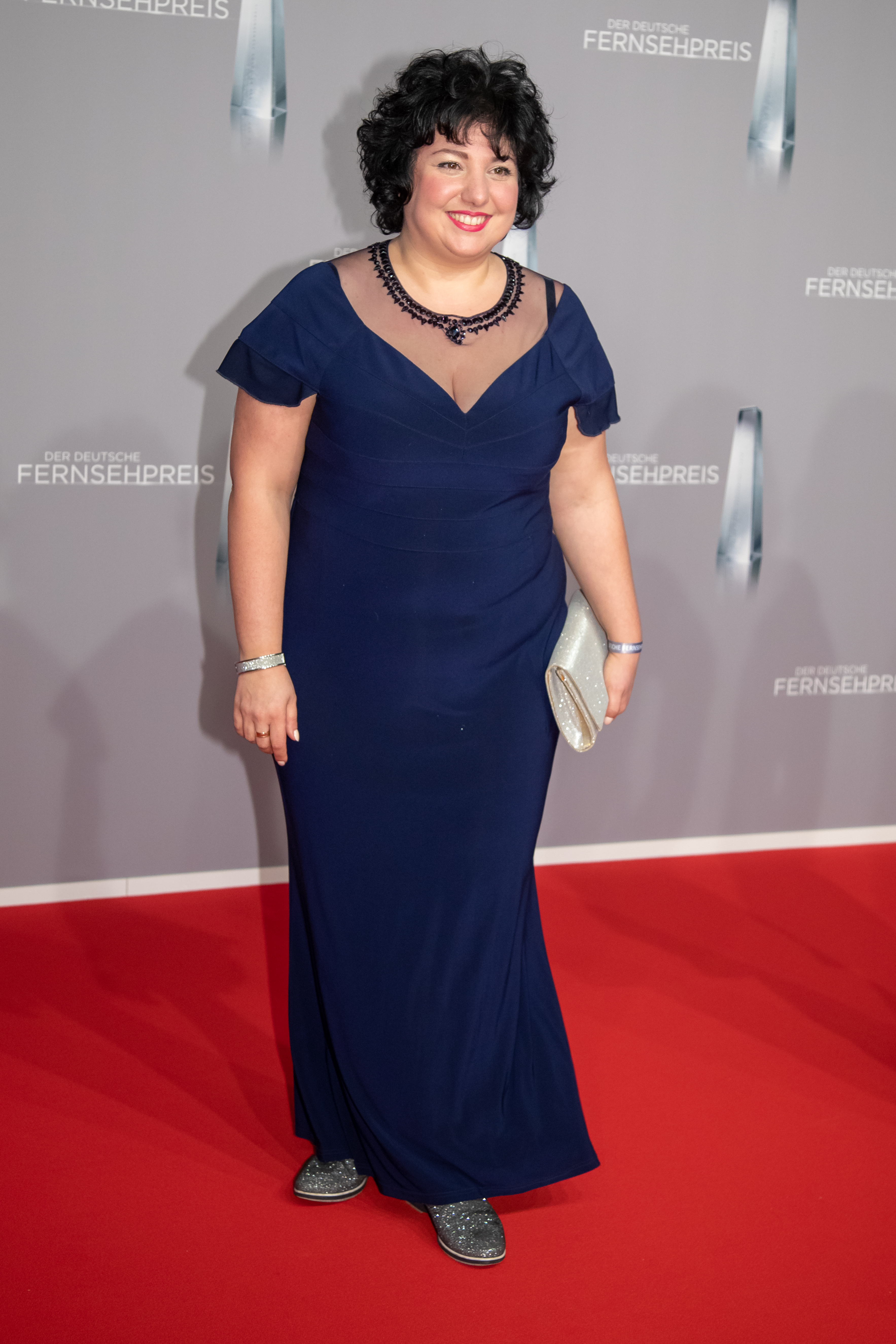 Meltem Kaptan beim Deutschen Fernsehpreis 2019 in der Düsseldorfer Rheinterrasse